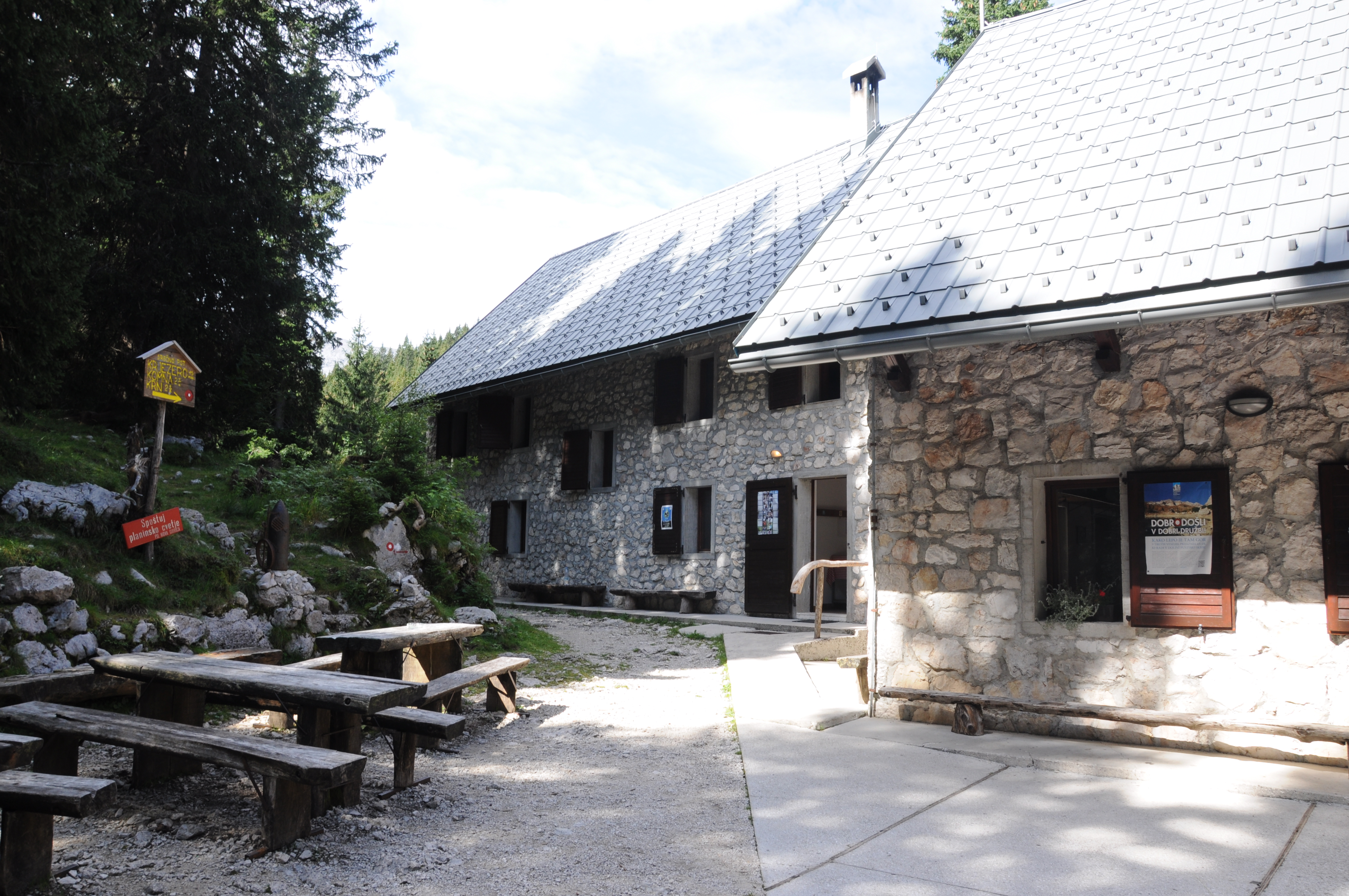 Planinski dom pri Krnskih jezerih.